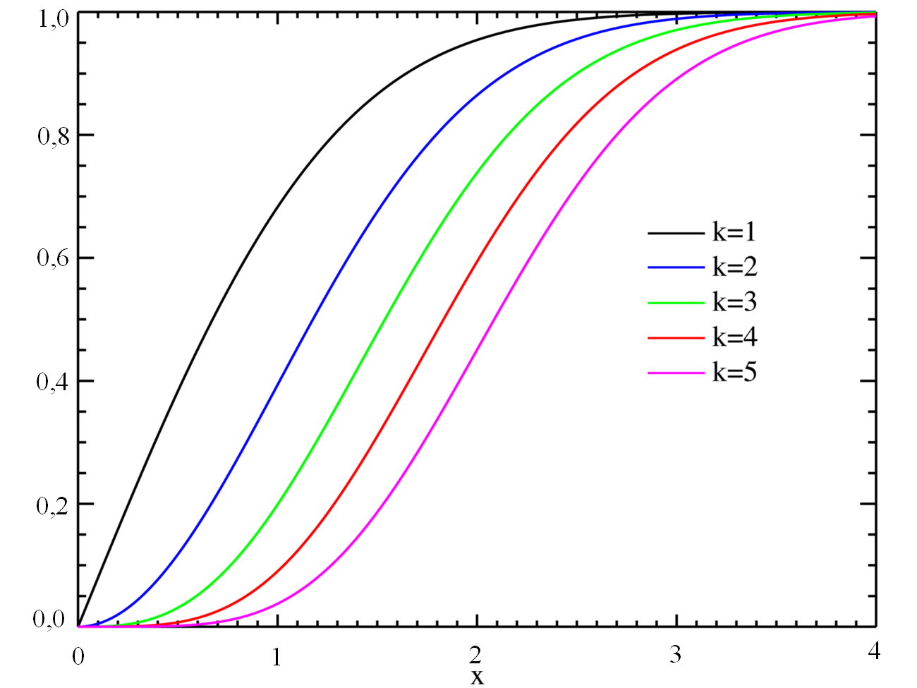 Zbirna funkcija verjetnosti porazdelitve hi.